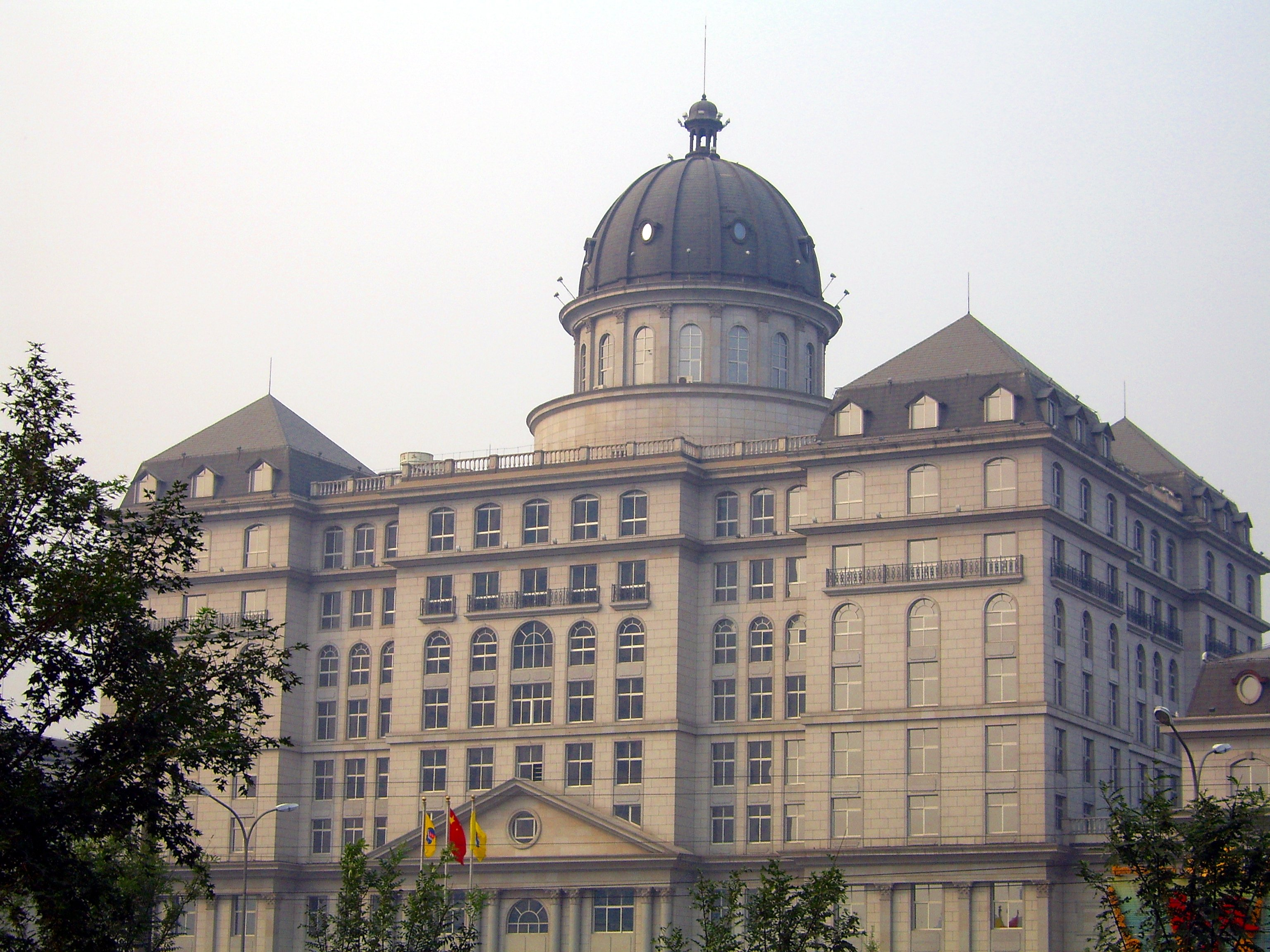 中国印钞造币总公司大楼